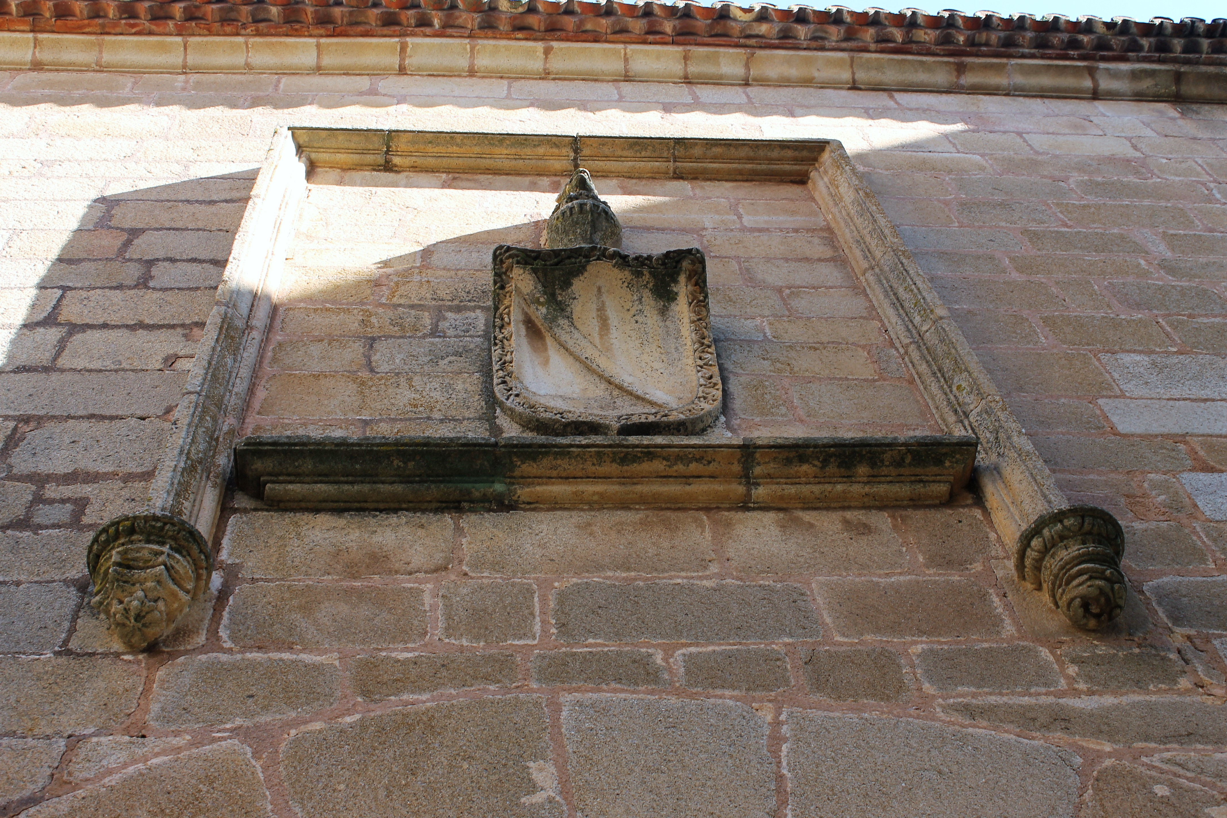 Blasón en alfiz de Carvajal. Cáceres, siglo XV.